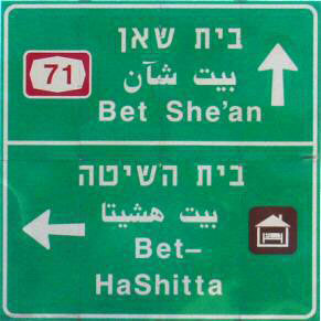 שלט דרכים - בית השיטה צולם ע"י טל כהן, מועבר לרשות הרבים (public domain)